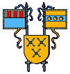 Wapenschild van Zaventem